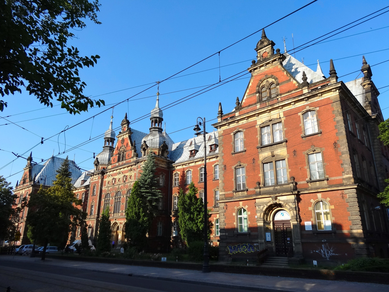 Budynek dawnej dyrekcji Kolei Wschodniej w Bydgoszczy, ul. Dworcowa 63, zbud. 1886-1889, od 2013 r. w gestii Collegium Medicum UMK